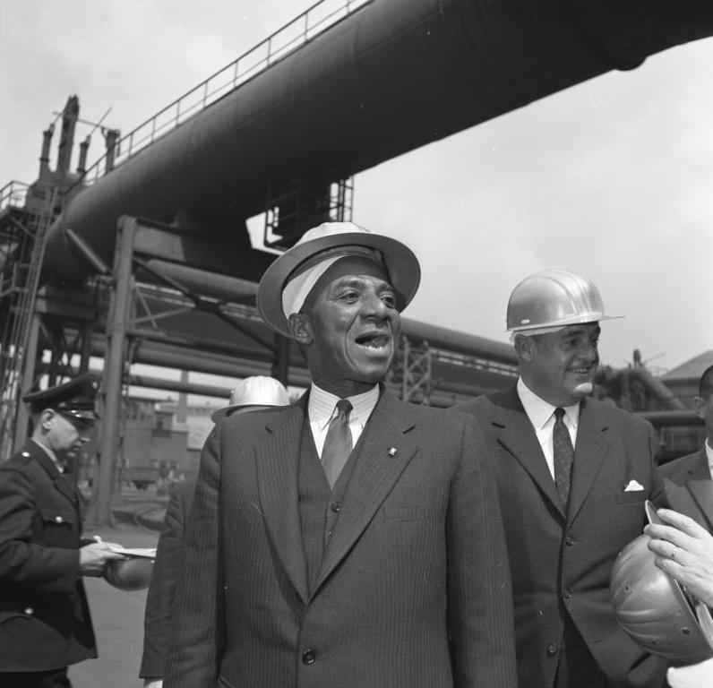 Staatspräsident von Togo, Olympio, zu Besuch bei der Firma Krupp, Essen